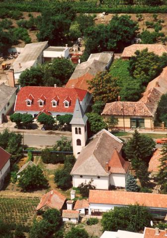 Tiszaföldvár, Hungary, aerialphotography